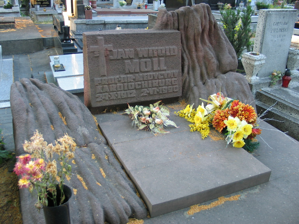 Grobowiec Jana Witolda Molla Łódź